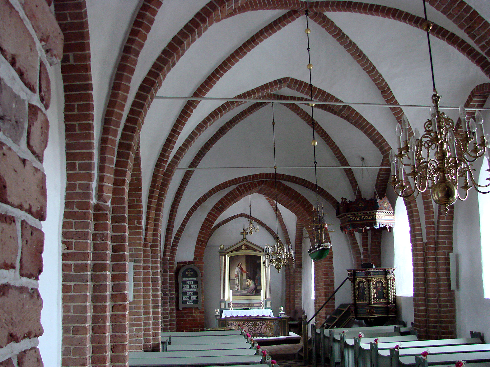 Foldby Kirke ligger i Foldby Sogn, Sabro Herred i det tidligere Århus Amt. Kirkebygningen er opført i granitkvadre i romansk stil, oprindeligt med rundbuede døre i både nord og sydsiden, og små romanske vinduer, og fladt træloft.